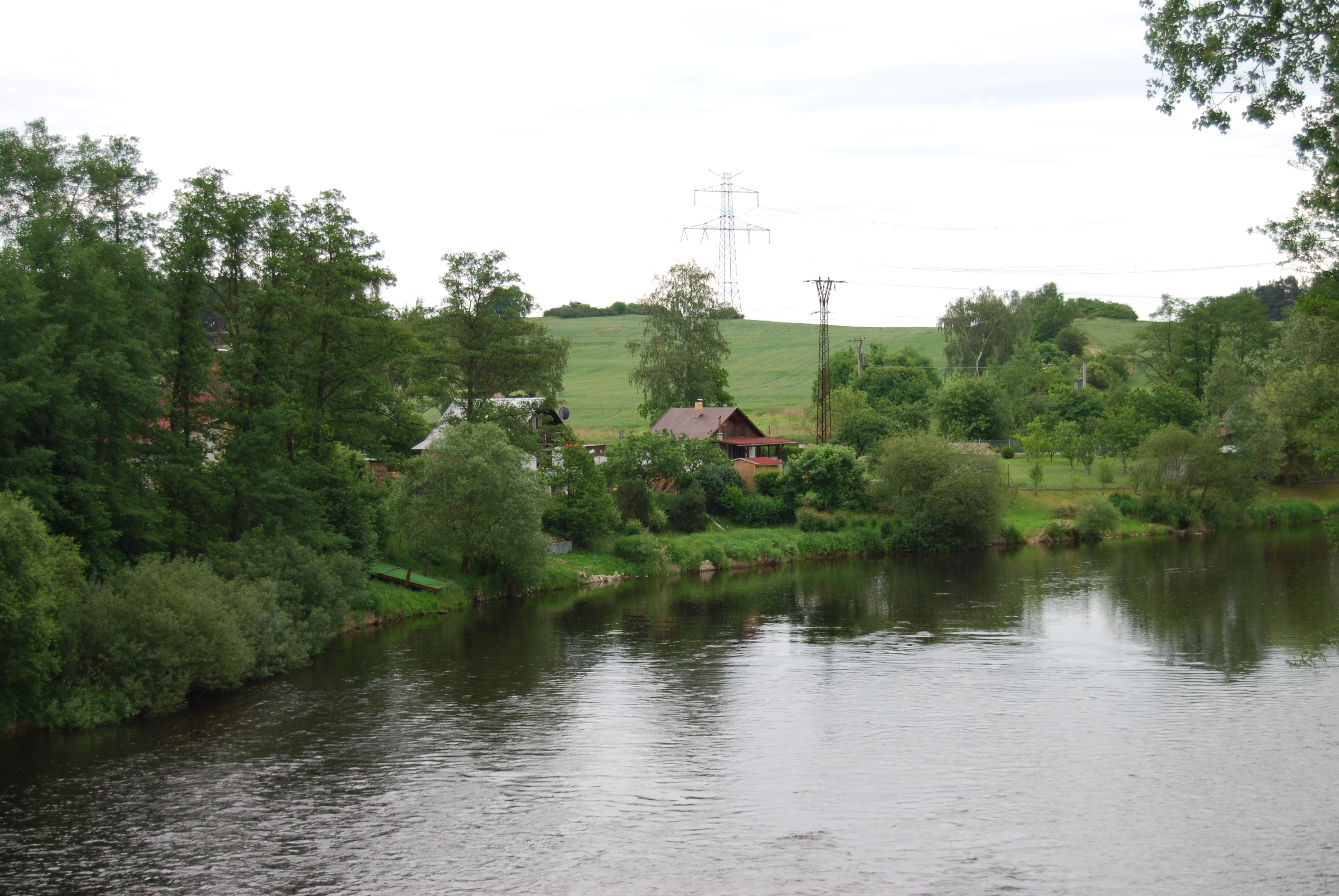 Pohled na řeku Otavu a chatovou oblast u Zátavského mostu. Zátaví je část obce Kestřany v okrese Písek. Česká republika.